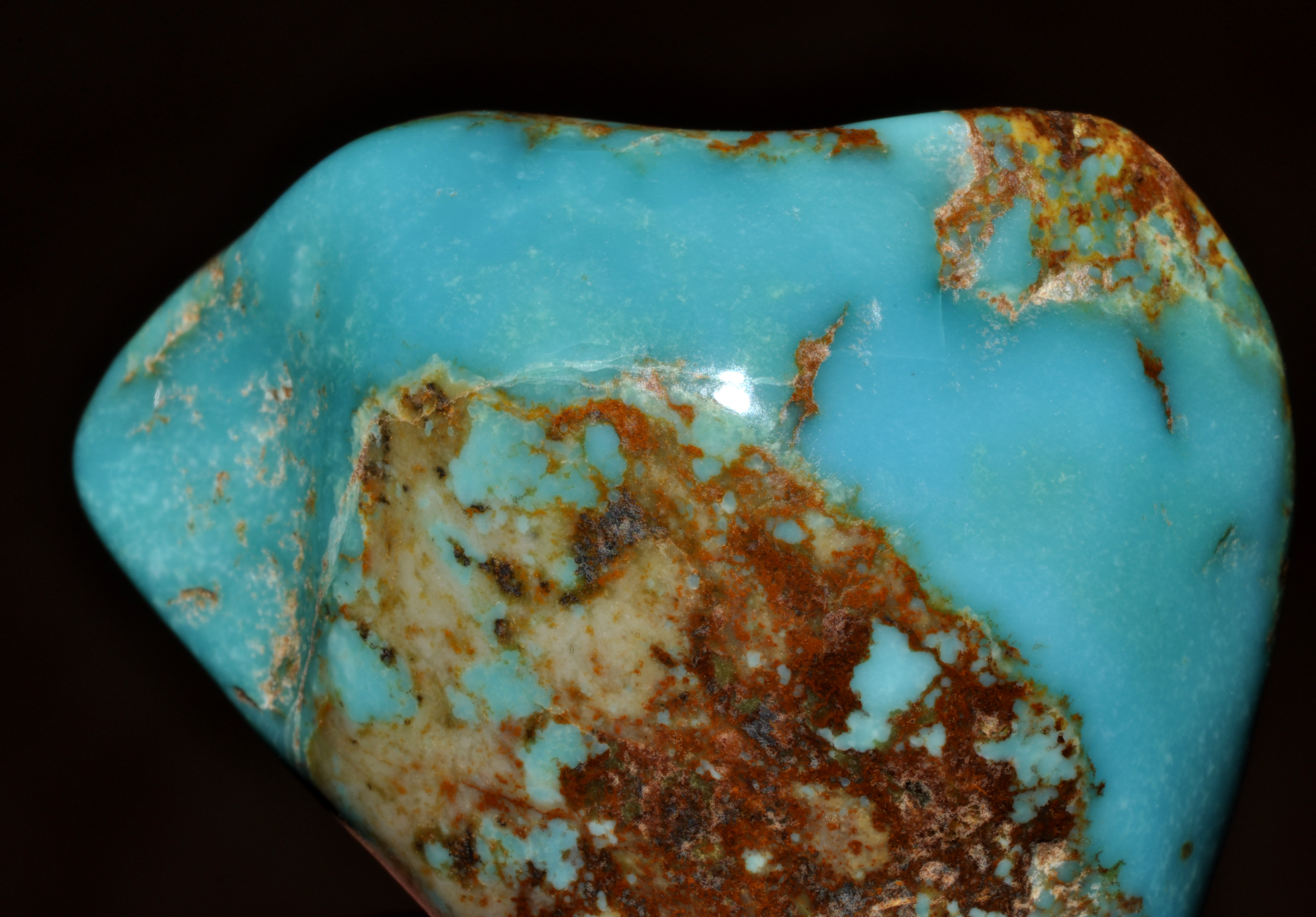 Morceau de turquoise polie.